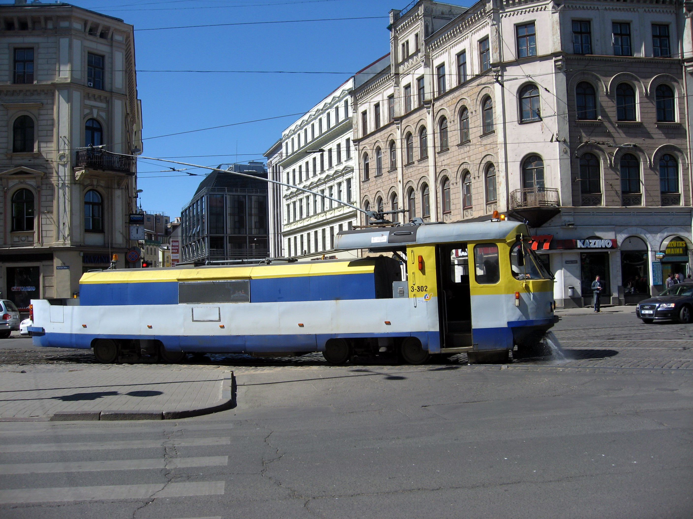 Riga, kropící tramvaj